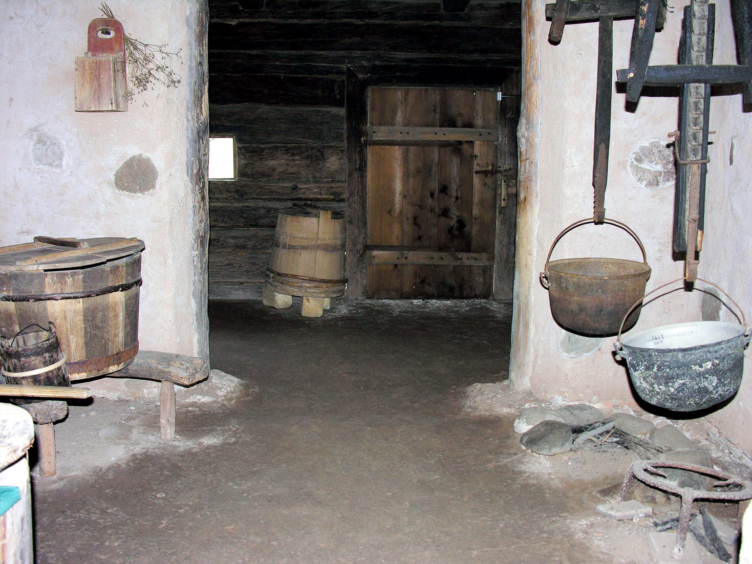 Kaminas 2007 m. balandžio 21 d., Lietuva